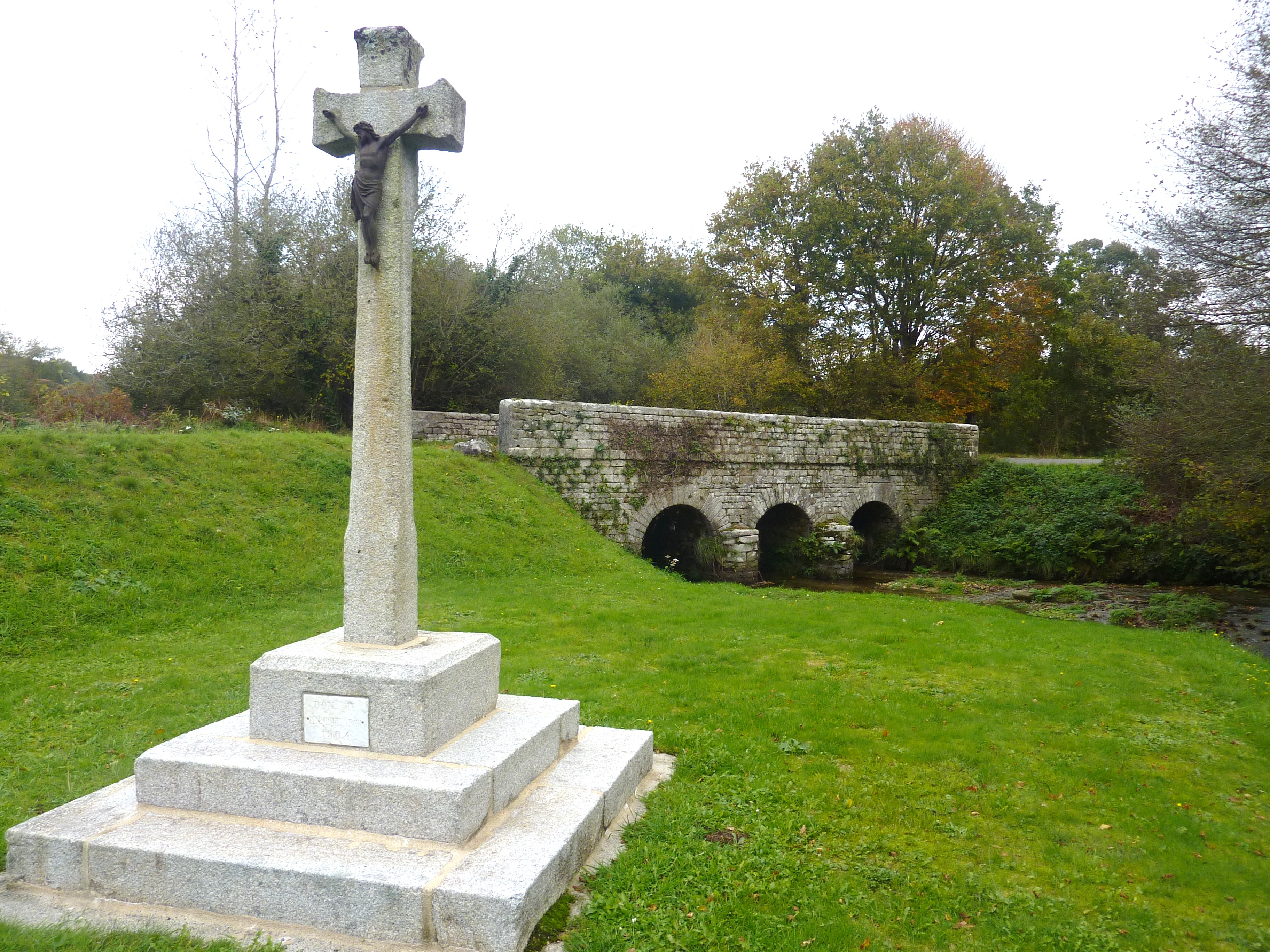 Commana : le calvaire du Bois de La Roche près de la Penzé (entre le moulin du Bois de la Roche et Poulfanc)